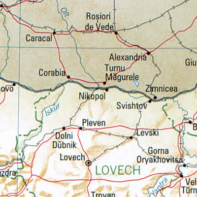 Nikopol - Lage des Ortes in Bulgarien vit kapi